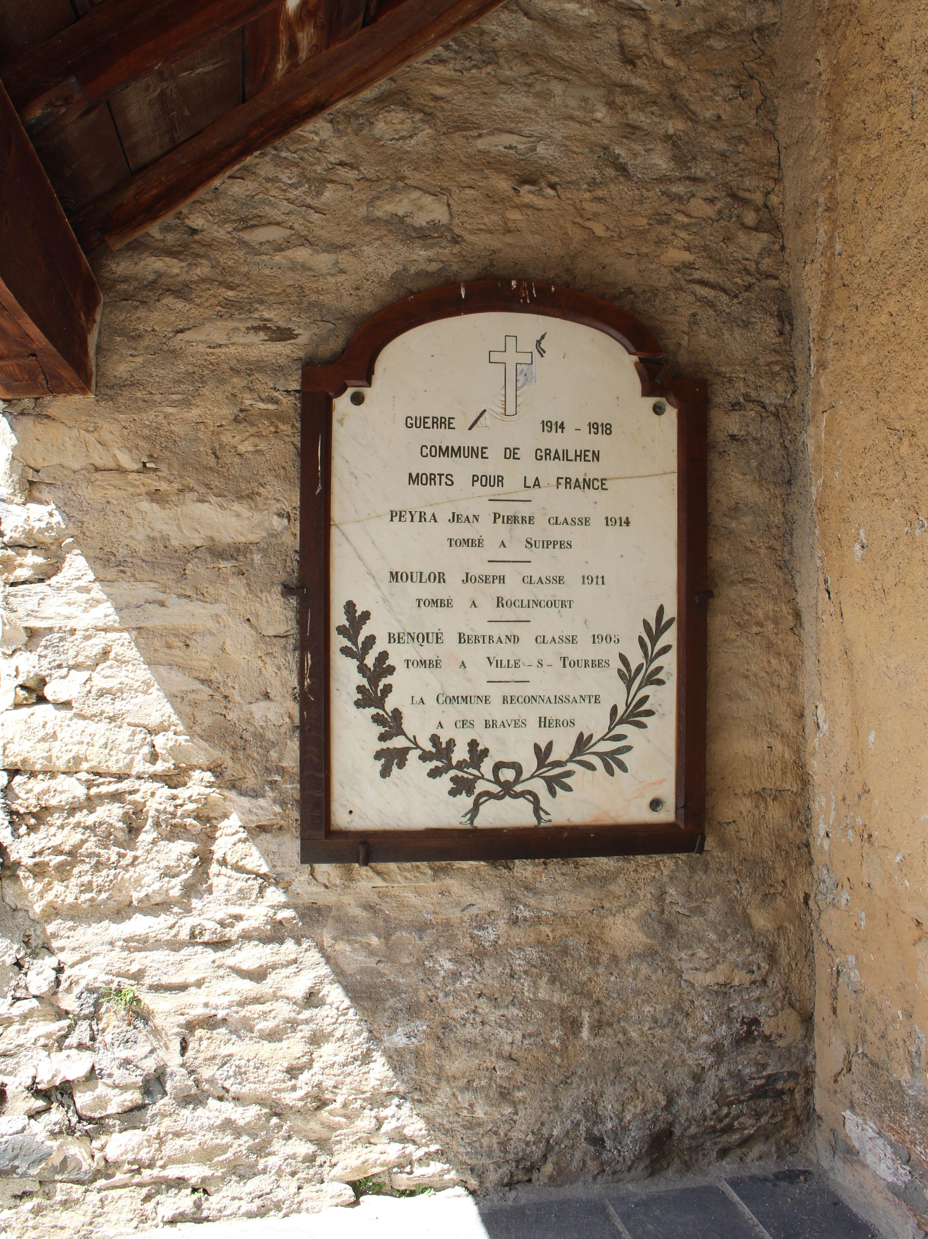 Monument aux morts de Grailhen (Hautes-Pyrénées)